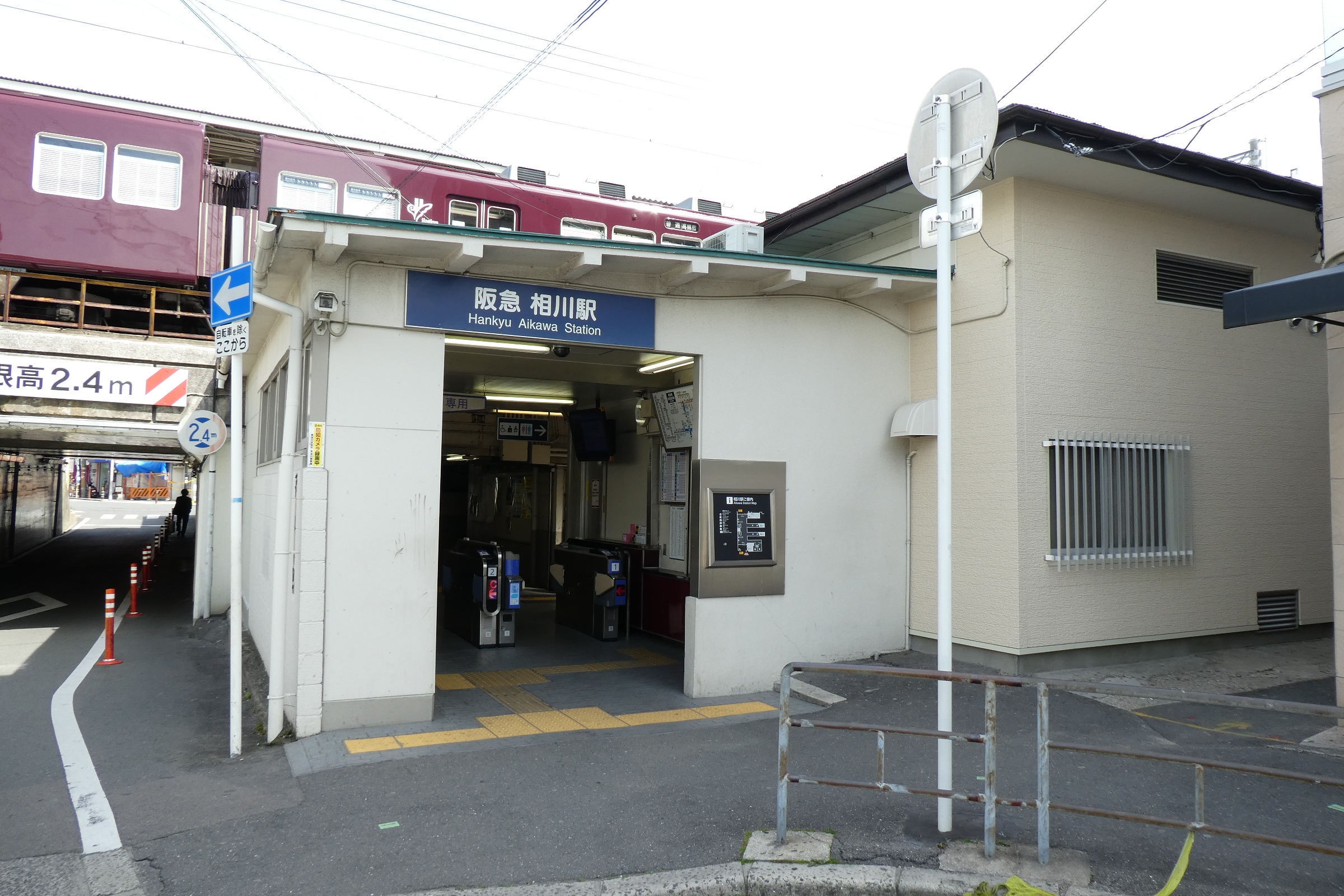 阪急相川駅西口。